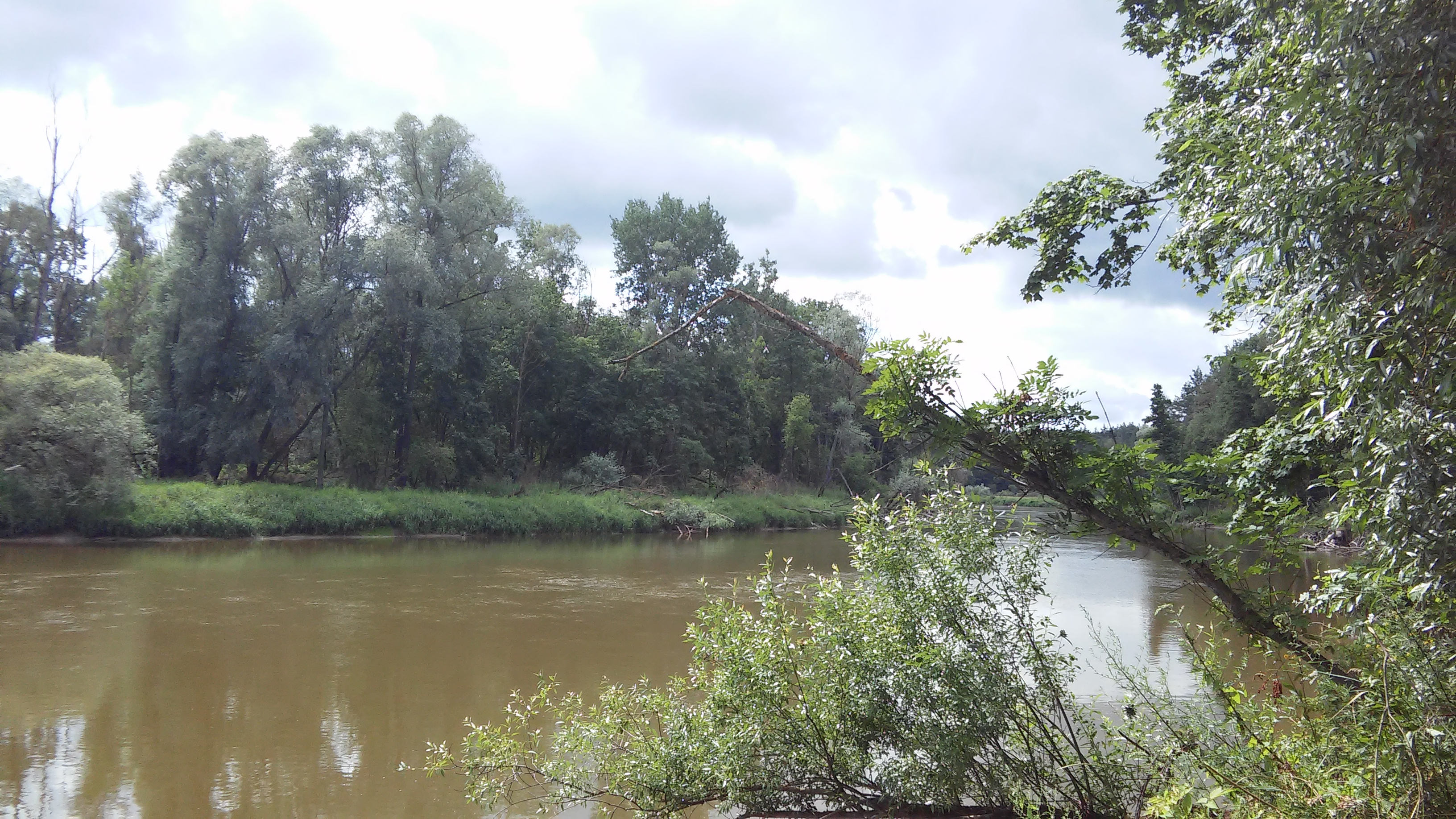 Bug w okolicach Kodnia.